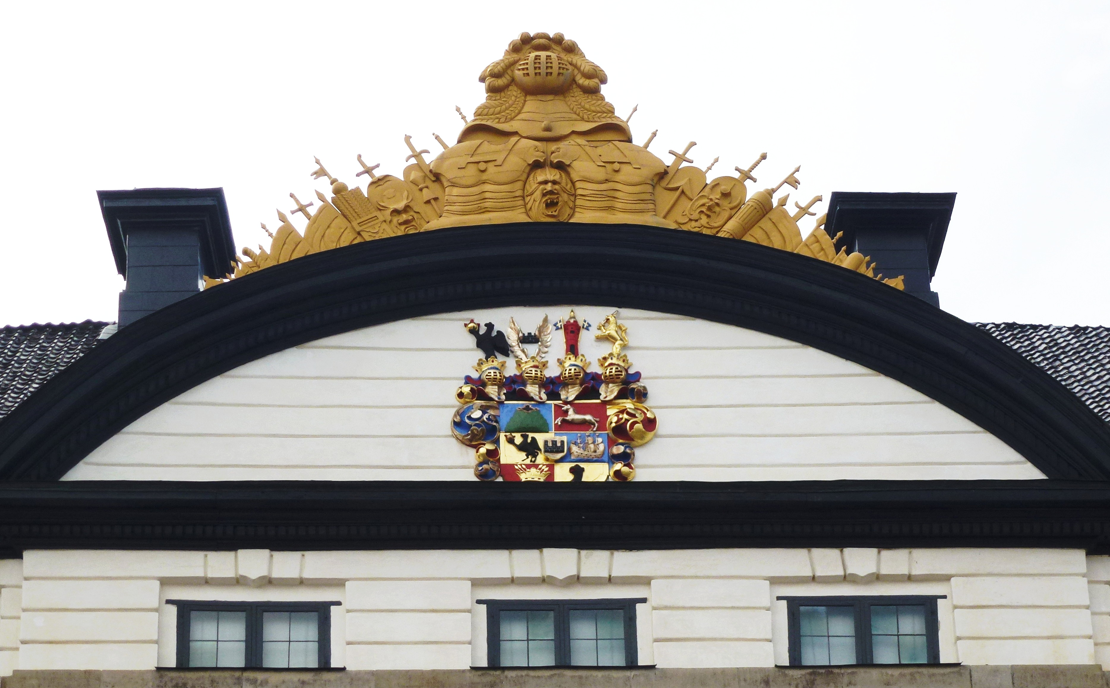 Skokloster fasad tympanon. Trofékrönet på Skoklosters slott rekonstruerades 2010. Den enda fasadutsmyckningen på Skoklosters slott utgörs av det Wrangelska vapnet i segmentgaveln över mittpartiet mot sjösidan och över den ett i ek snidat och gulmålat trofékrön. Båda utfördes år 1657 av den tyske träbildhuggaren Markus Hebel (död 1664).